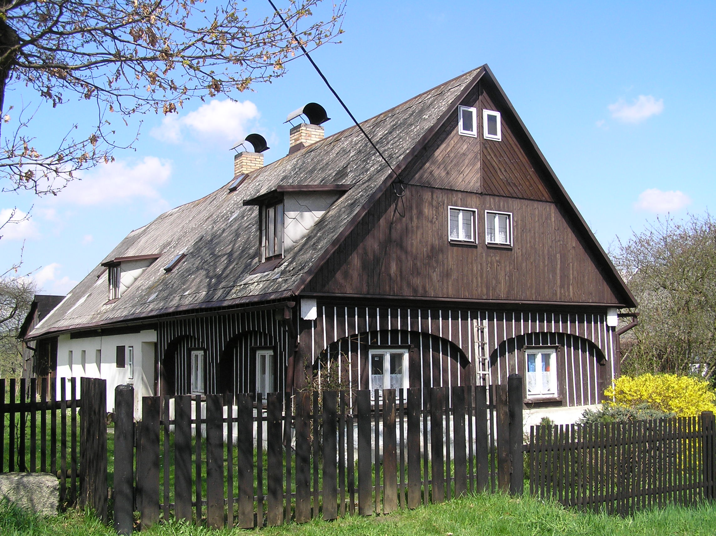 Karlov pod Ještědem - lidová architektura Českolipská če. 1